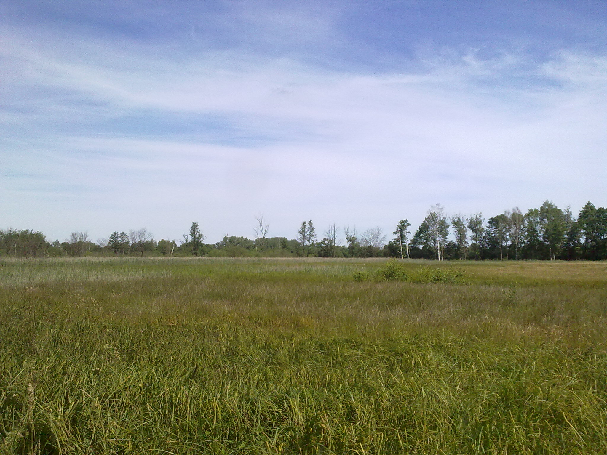 Naturschutzgebiet „Schnepfenried“ in der Stadt Cottbus, Brandenburg, Blick Richtung Nordwesten